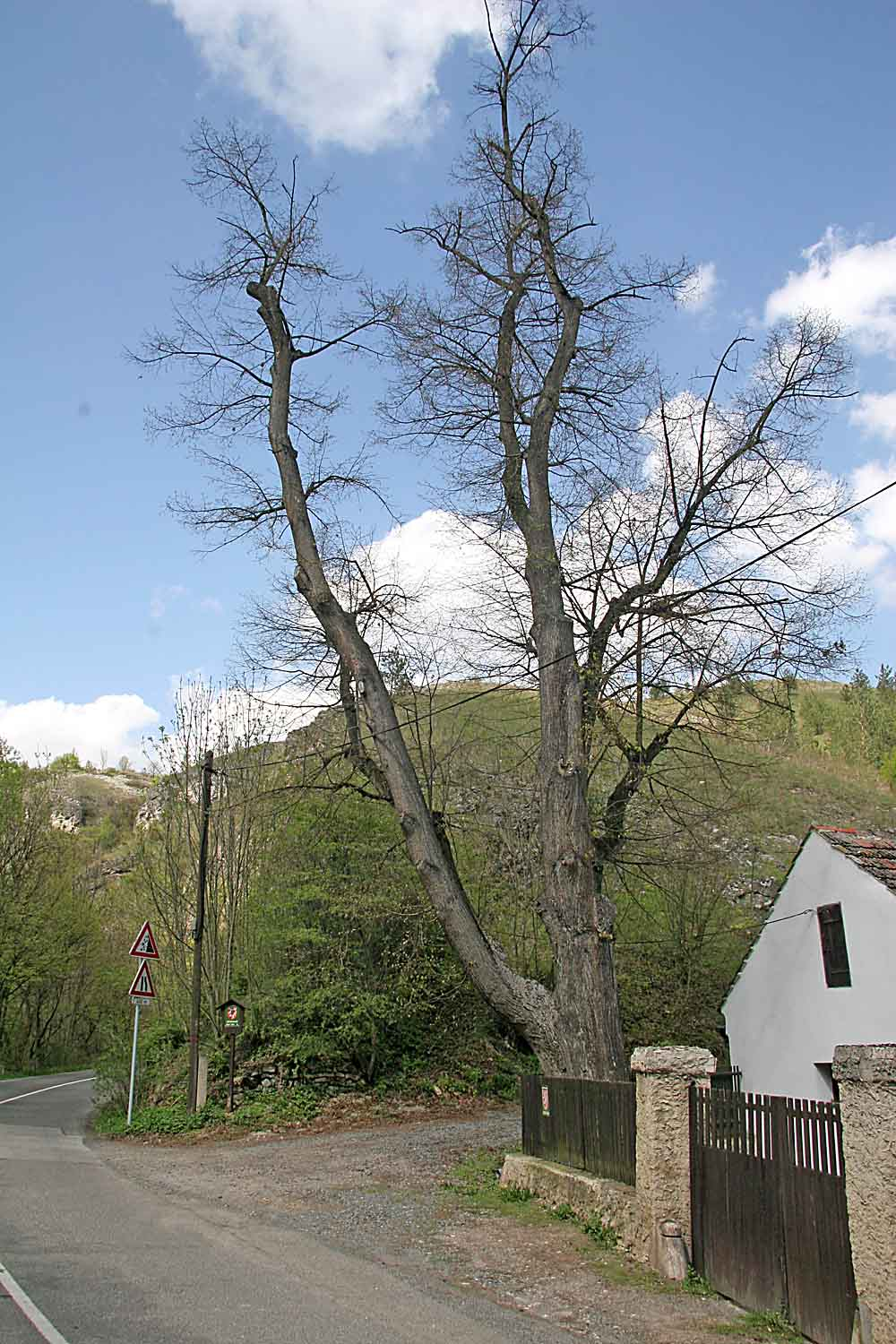 Památná lípa v osadě Cikánka, Praha-Radotín, u domu č. p. 24, č. o. 9 v ulici Na Cikánce.